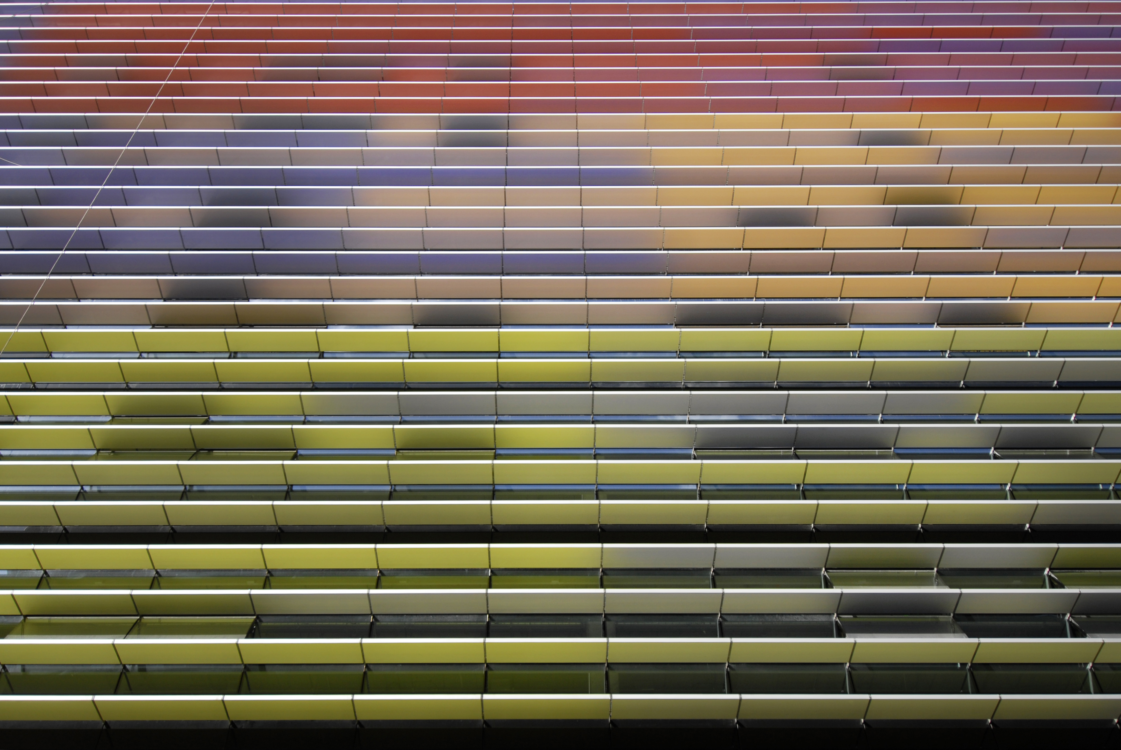 Brise Soleil (Parasoles) Detalle. José Antonio Sosa, Magüi Gonzalez, Miguel Santiago, architects: Law Courts Complex in Las Palmas de Gran Canaria (2004-2010) [1]